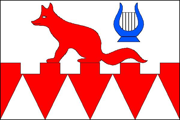 Vlajka obce Hukvaldy